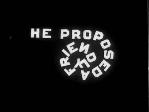 intertritre en mouvement dans "How Jones lost his roll" (1905; E.S. Porter)